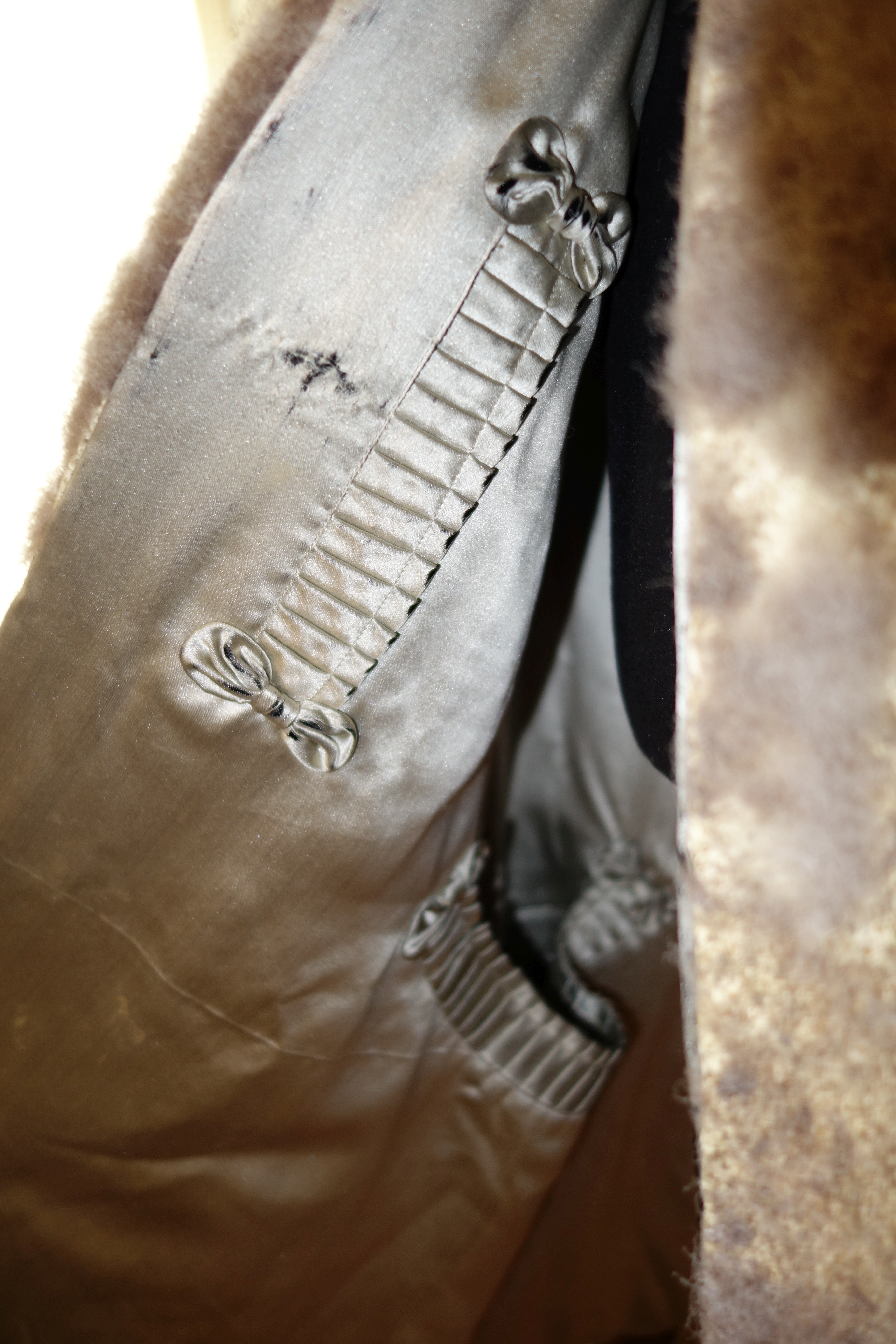 Clara Schumanns Schwanenpelz. Clara Schumanns Schwanenpelz ist heute ein Teil der Sammlung der Clara-Schumann-Gedenkstätte im Schumannhaus Düsseldorf, in dem die Schumanns von 1852 bis 1855 wohnten. Clara Schumann (* 1819; † 1896, geborene Wieck), war eine deutsche Pianistin und Komponistin, sie war die Ehefrau des Komponisten Robert Schumann. Das Seidenfutter mit gefälteten Innentaschen mit Zierschleifenabschluss.